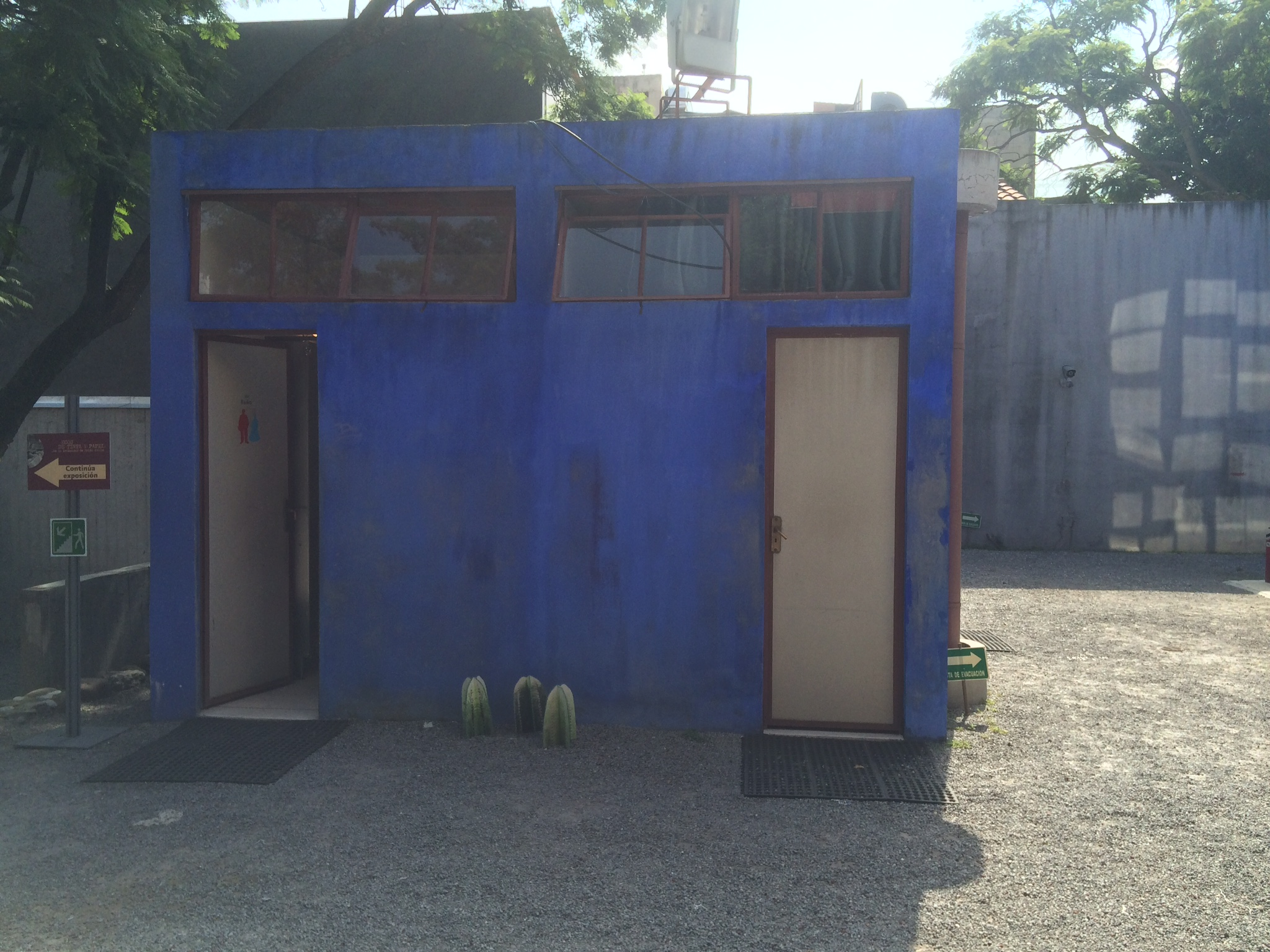 Originalmente este espacio era un estudio fotográfico en la Casa Estudio Diego Rivera y Frida Kahlo en San Ángel. Ahora se adaptaron a oficinas y W.C. para las visitas.